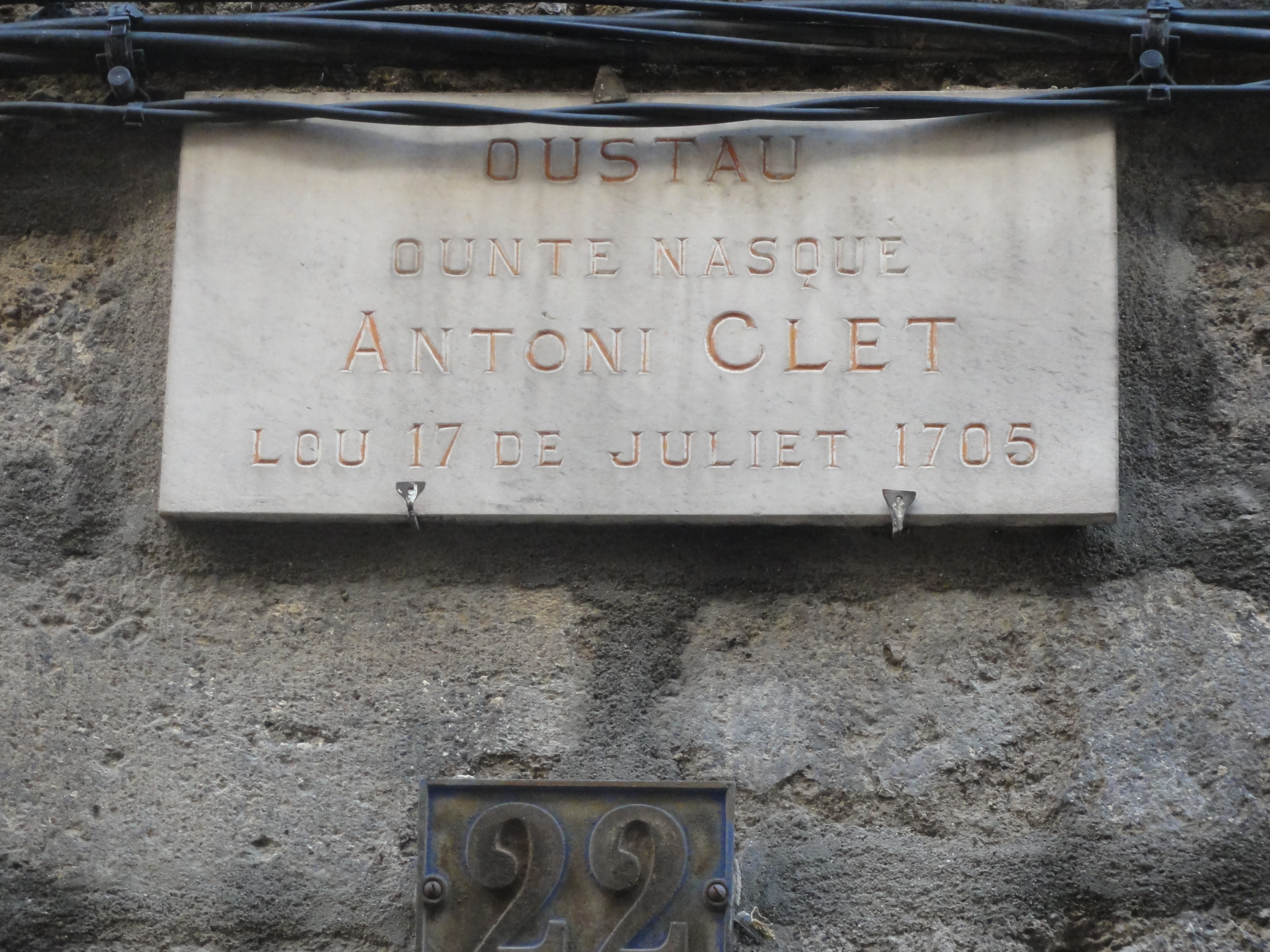 Plaque sur le logis d' Antoine Clet - Maître-imprimeur du 18eme siècle et écrivain